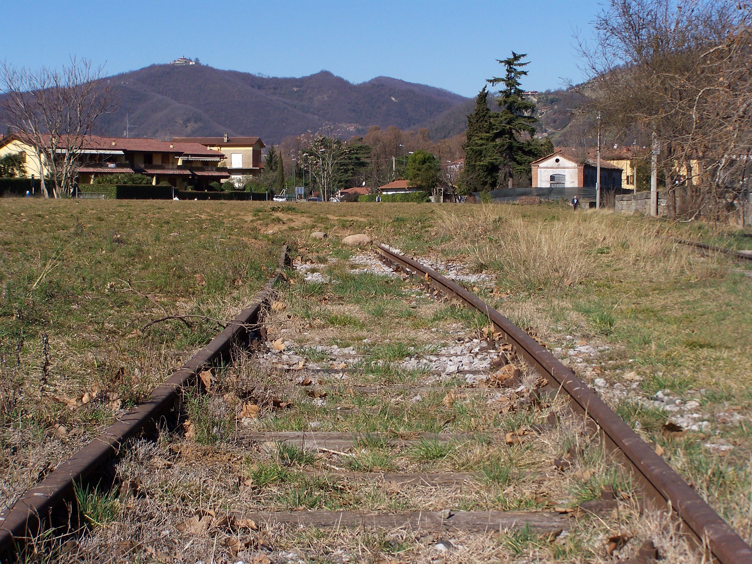 Situazione dell'Imbarcadero di Rivatica a Paratico sul Lago d'Iseo nel 2008. Il binario che riaffiora dal cumolo di terra nei pressi del pontile. Sullo sfondo a destra si può osservare l'edificio della Carbonaia.